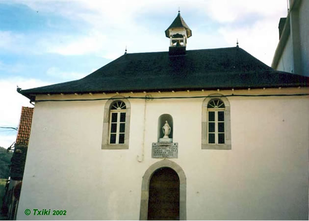 Chapelle de Barcus (Barkoxe) Pyrénées).